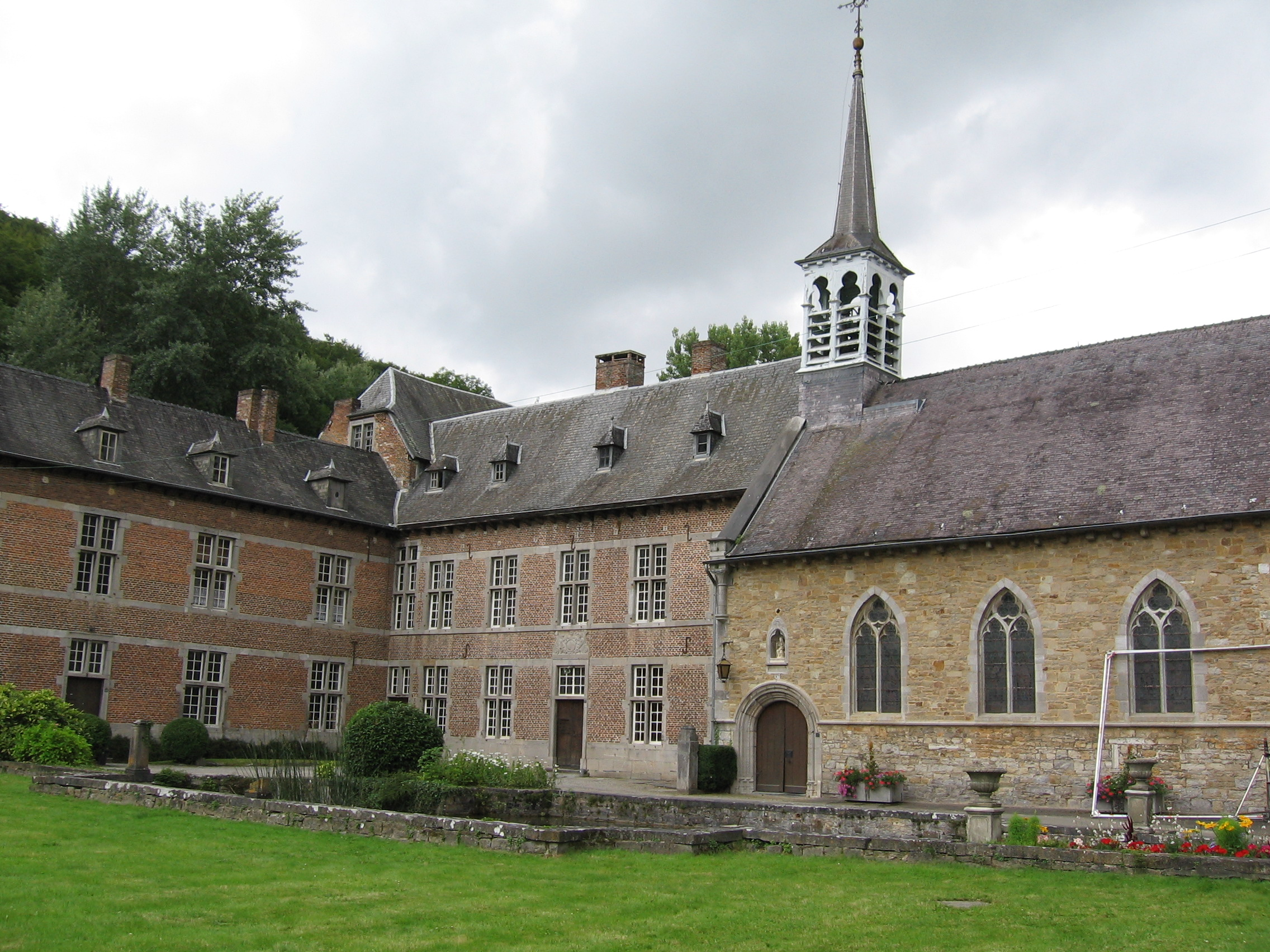 Ancienne abbaye de Marche-les-Dames, près de Namur en Belgique